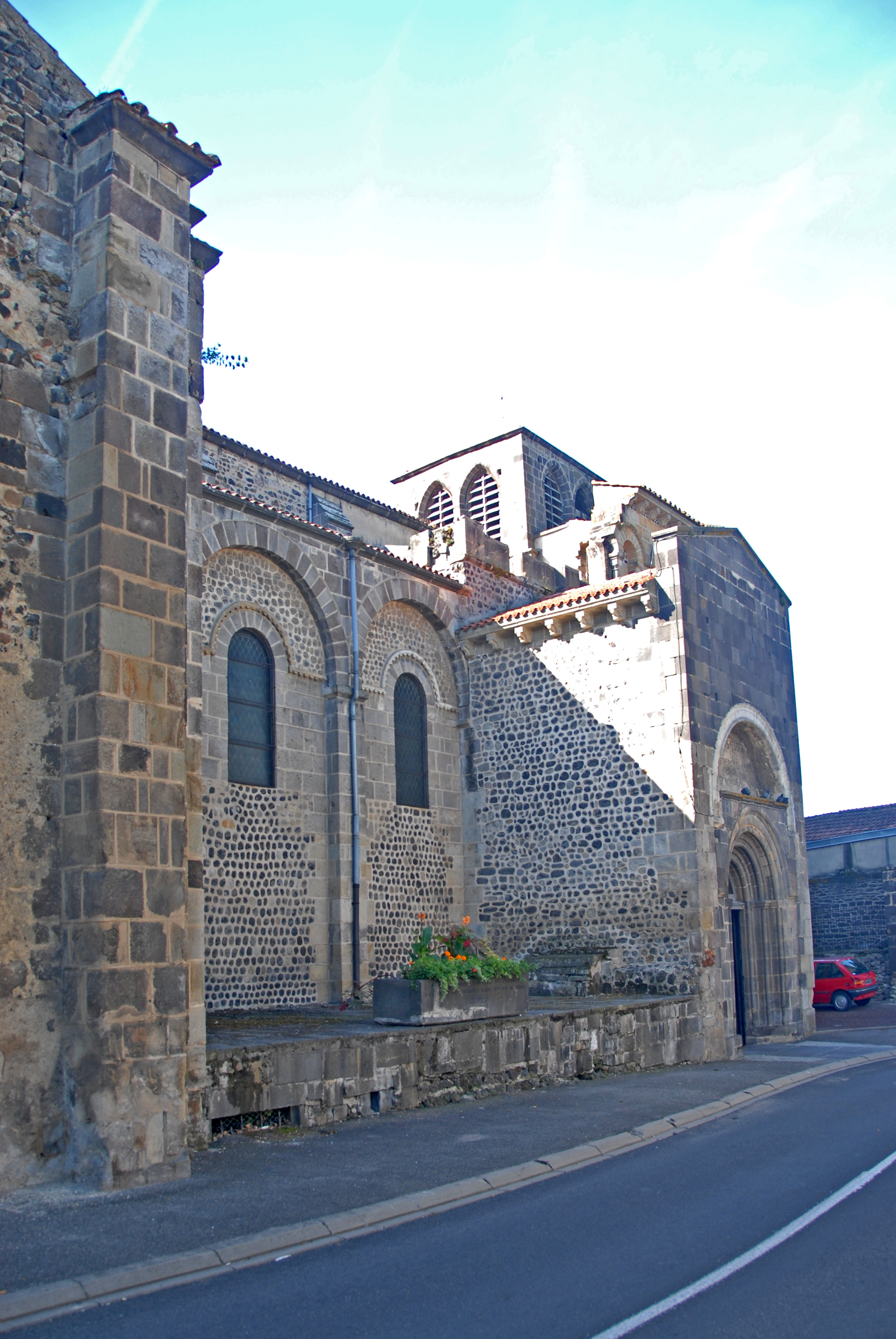 Mozat, Langhaus von NO,Narthex bis Querhausarm